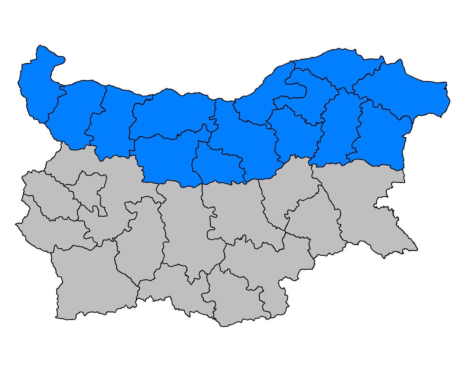 Северна България